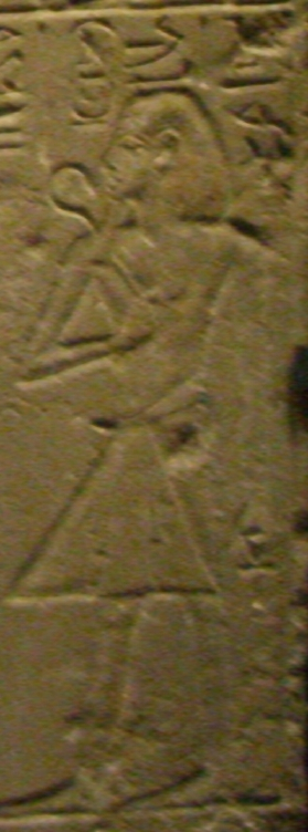 Le pharaon Menkaouhor. Détail de la stèle du médecin Tchoutchou adorant les dieux de la nécropole de Saqqarah.